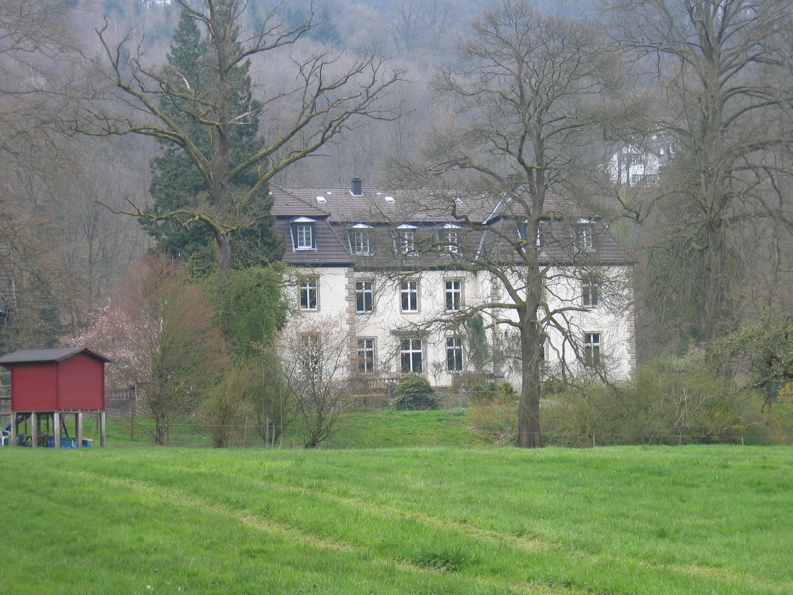 Burg Alsbach in Engelskirchen